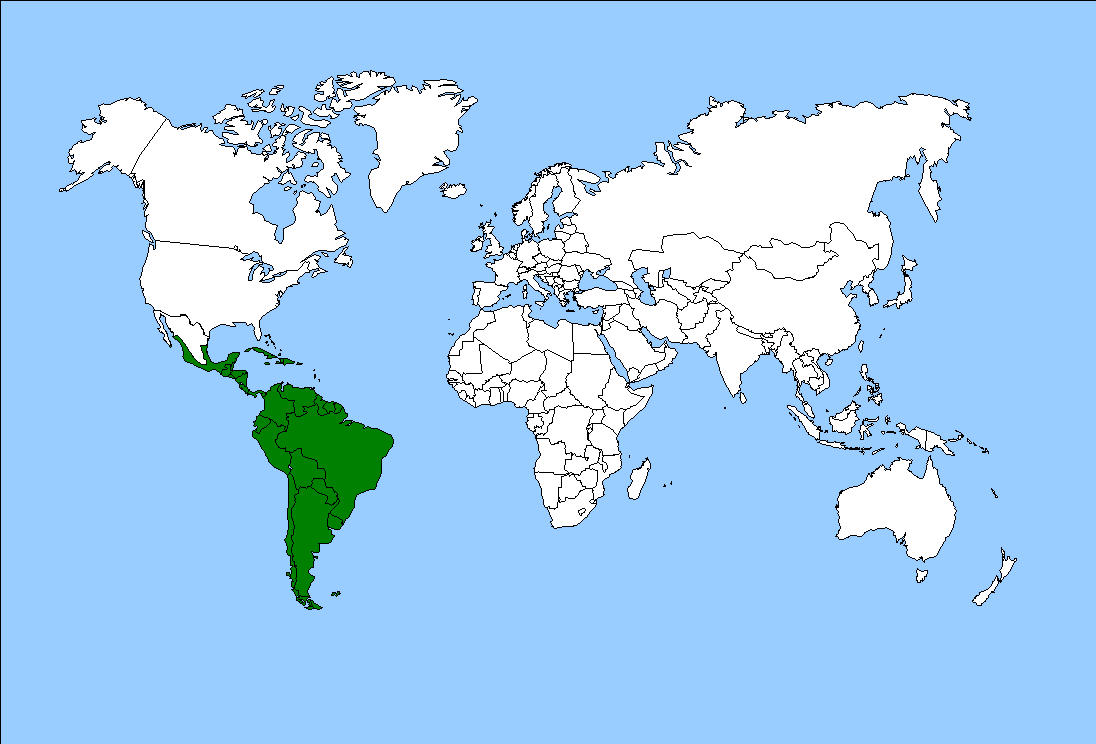 écozone néotropique